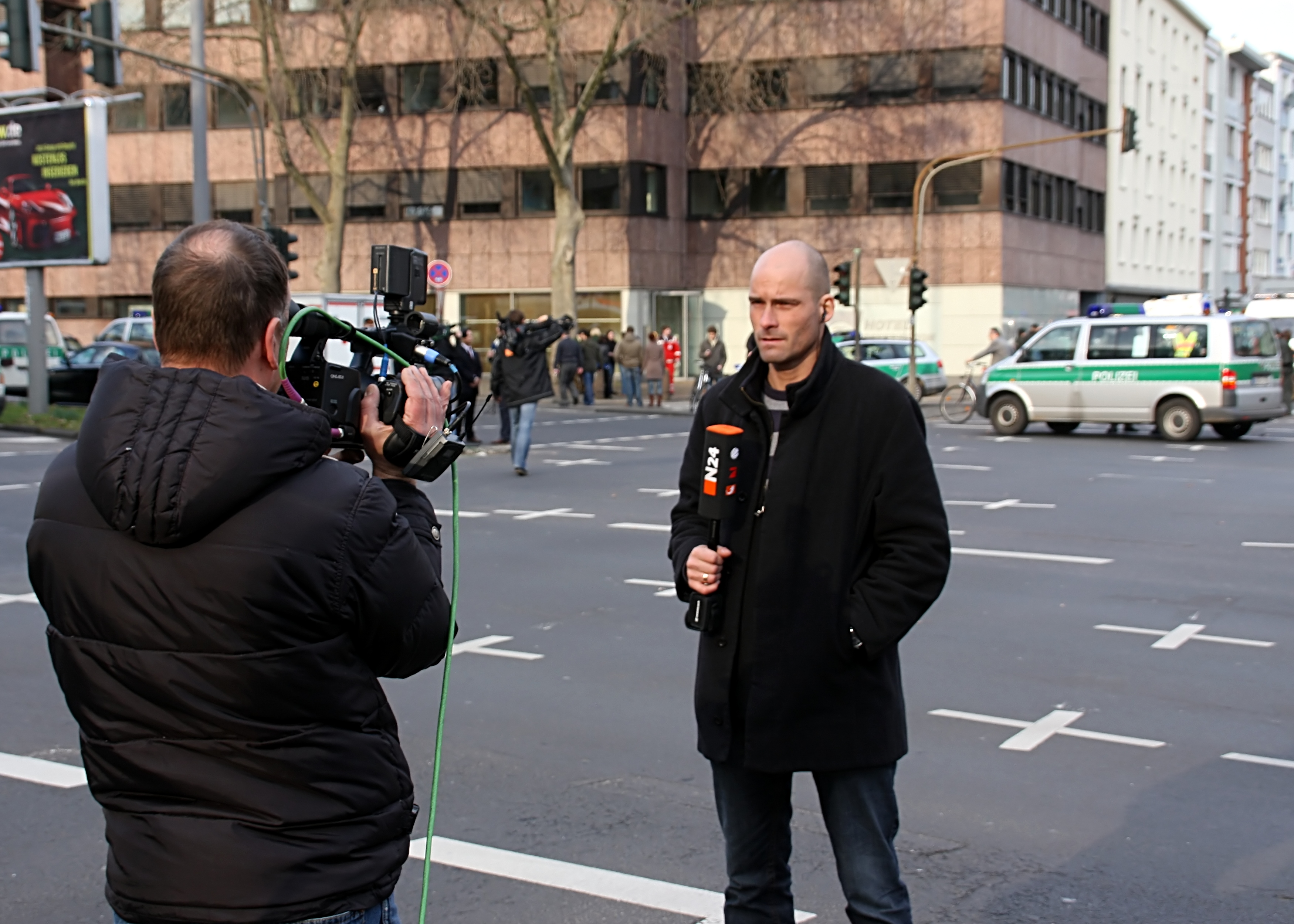 N24-Reporter Steffen Schwarzkopf mit Kameramann in Köln. Reportage vom Einsturz des Historischen Stadtarchivs. Kreuzung Rothgerberbach/Blaubach/Tel-Aviv-Straße (Nord-Süd-Fahrt)